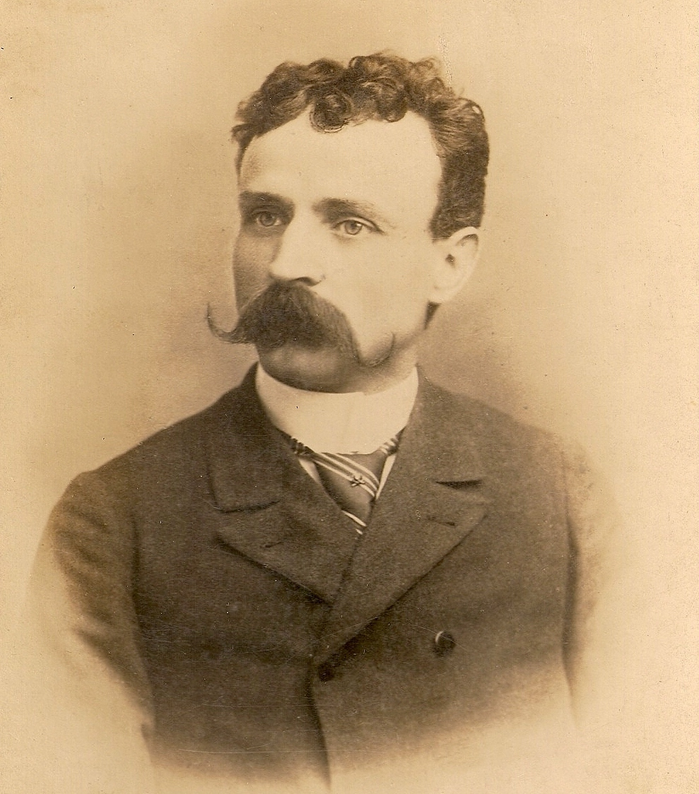 Foto de Eduardo Longhi